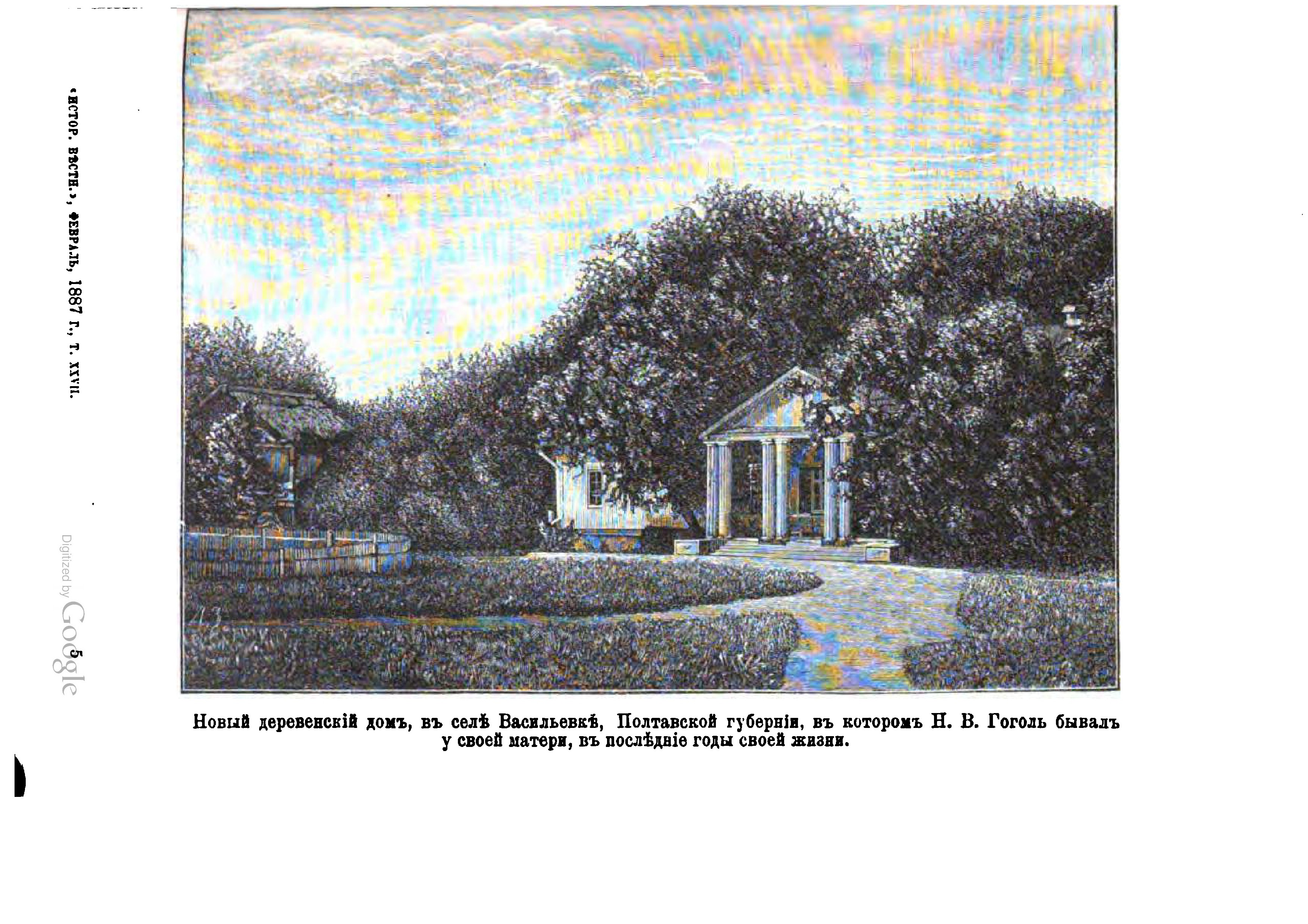 Новый деревенский дом в селе Васильевке Полтавской губернии, в котором Н. В. Гоголь бывал у своей матери в последние годы своей жизни.